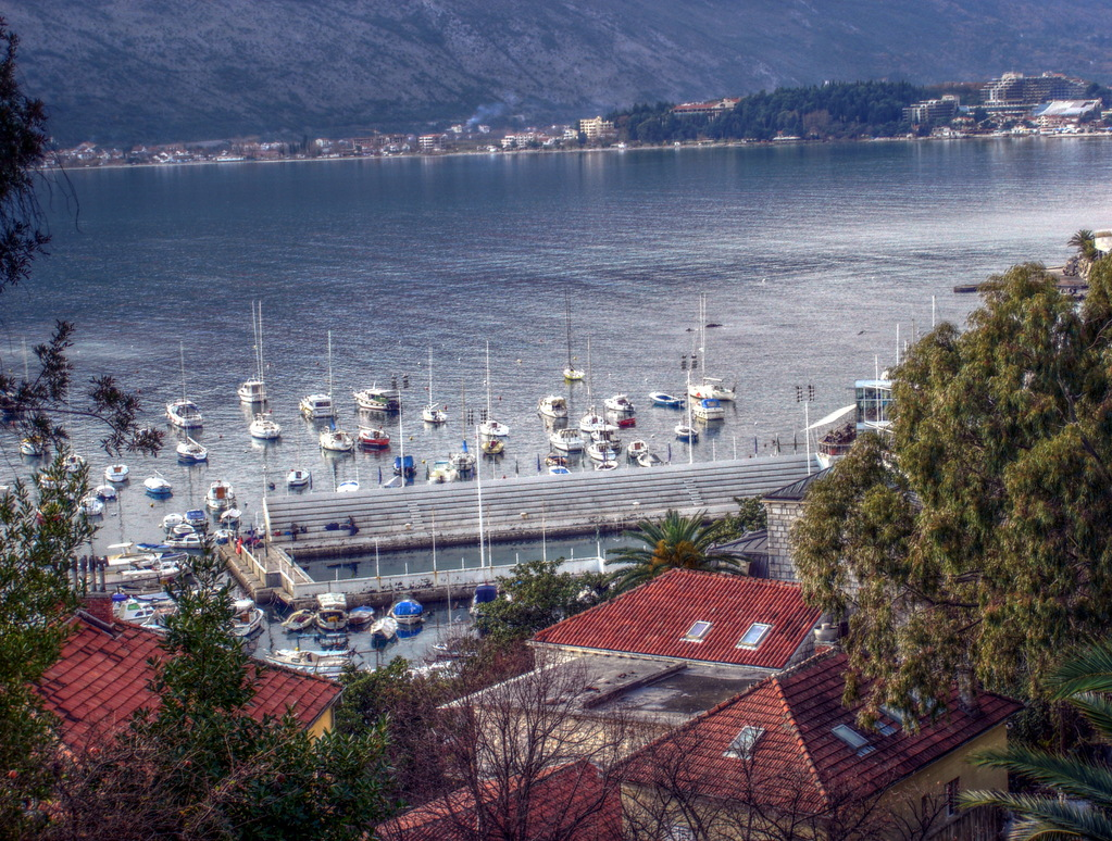 HDR слика луке у Херцег-Новом.